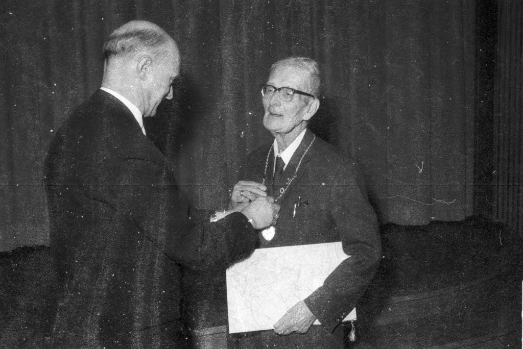 Der stellvertretende Vorsitzende des Schleswig-Holsteinischen Heimatbundes (SHHB) Christian Petersen (links) verleiht die Kette an den Kunst- und Kulturhistoriker Dr. Harry Schmidt (rechts).